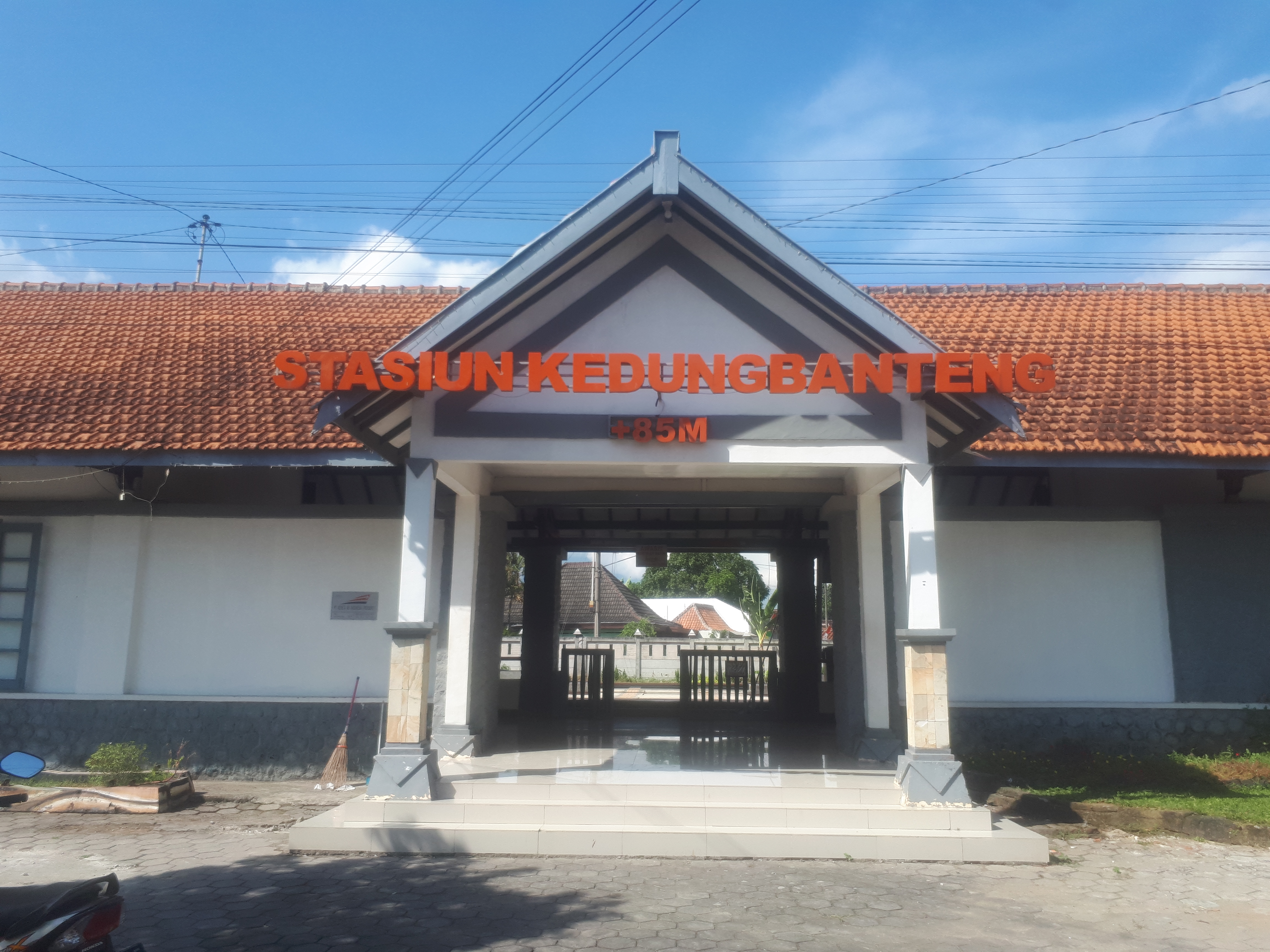 Tampak depan Stasiun Kedungbanteng, 2020